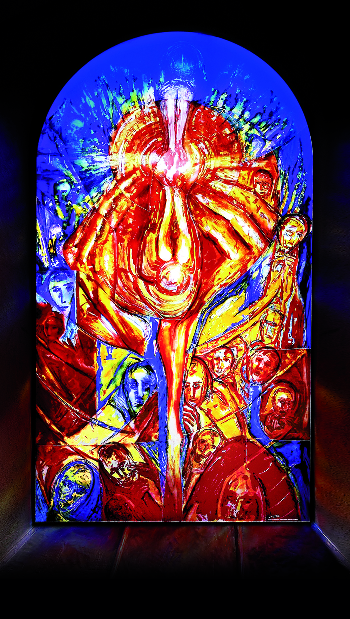 Das Bild zeigt Chorfenster der Kirche von Hochheim.